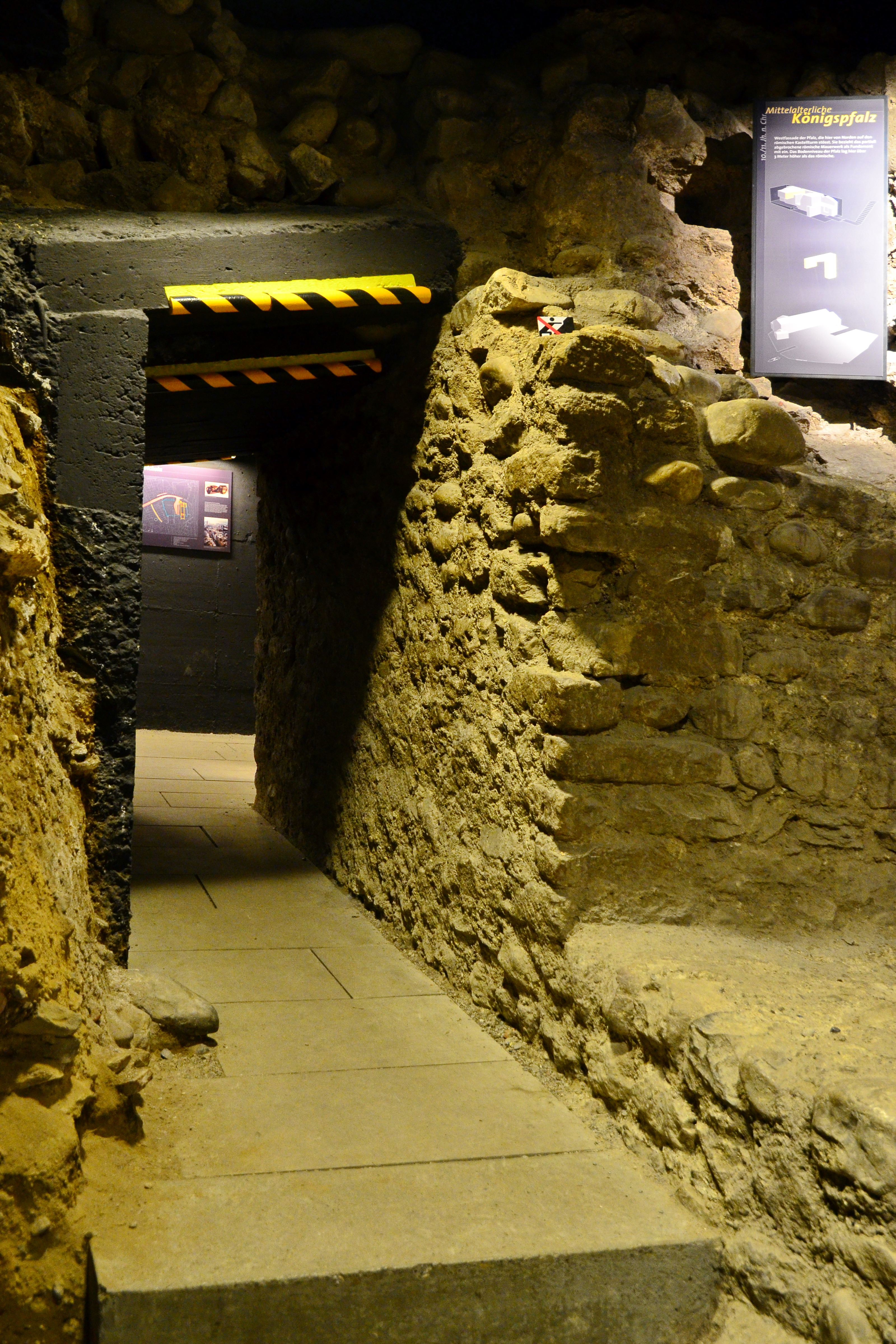 Lindenhof-Keller, Turicum (Zürich) : Mittelalterliche Königspfalz: Westfassade der Pfalz, die hier von Norden auf den römischen Kastellturm stösst. Sie bezieht das partiell abgebrochene römisches Mauerwerk als Fundament mit ein. Das Bodenniveau der Pfalz lag hier über drei Meter höher als das römische (gemäss Beschreibung).